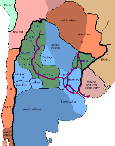 expedicion de lavalle en la guerra civil de la coalición del norte